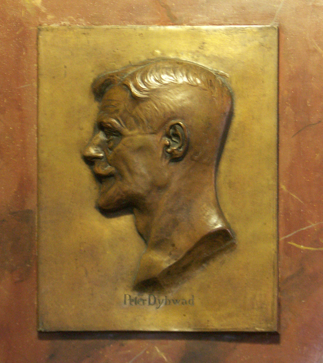 Relief des Architekten Peter Dybwad im Haus Thomaskirchhof 20 in Leipzig